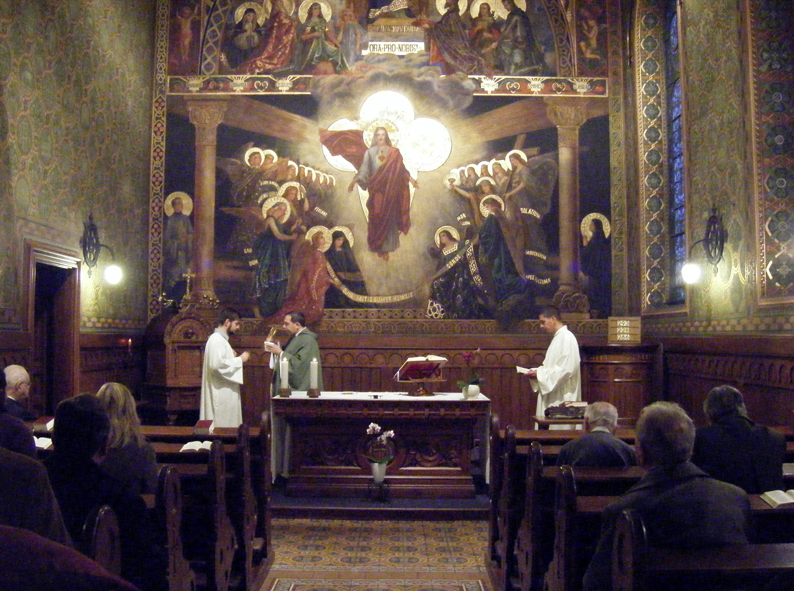 Pázmáneumi kapelle